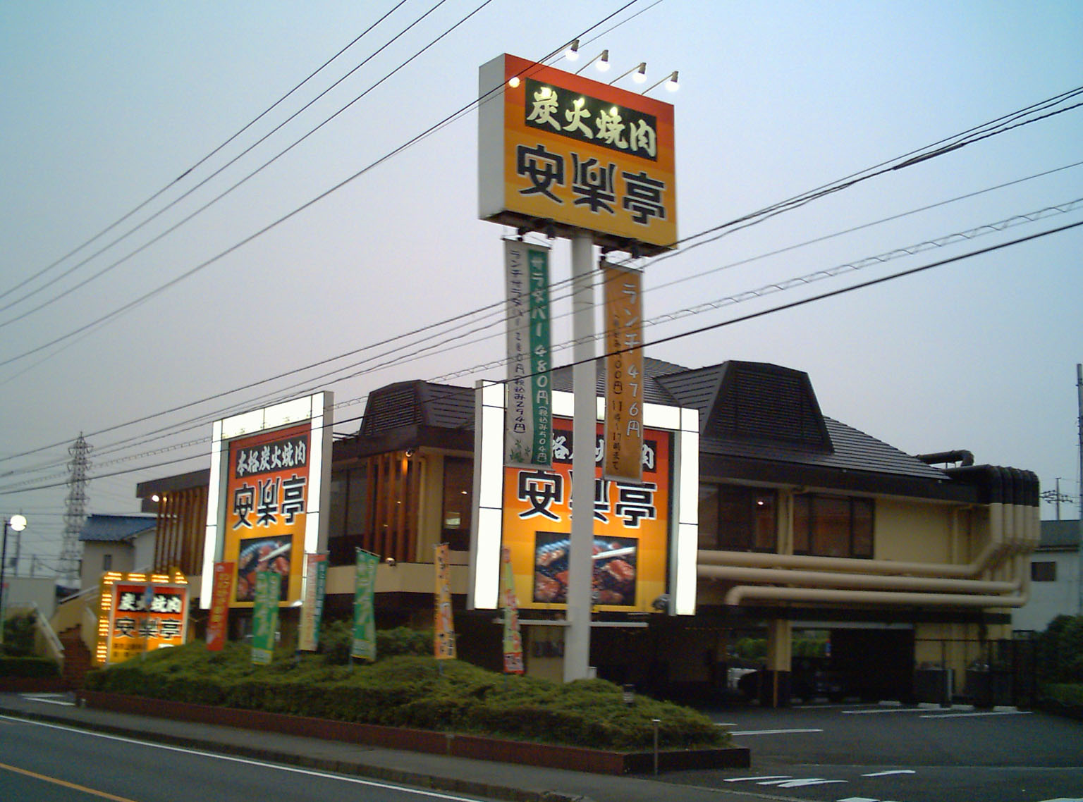 anrakutei_Restaurant_Japan photography day, 2006.10.20. photography person kici 安楽亭